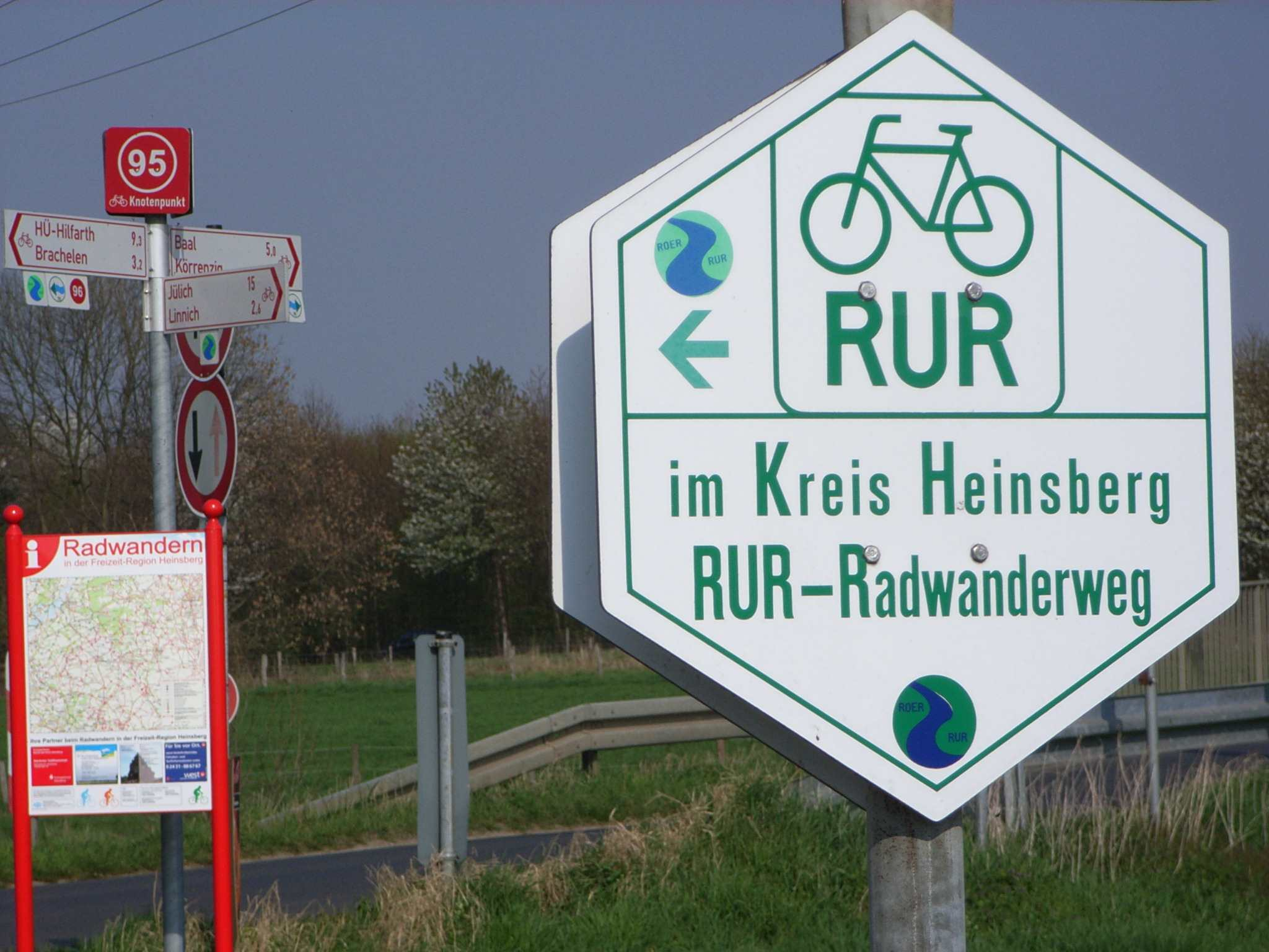 Ruruferradweg Beschilderung